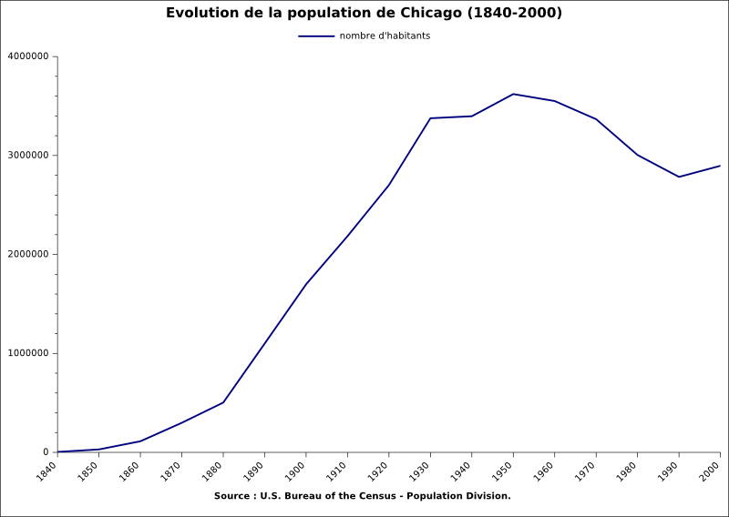 graphique représentant l'évolution de la population de Chicago de 1840 à 2000